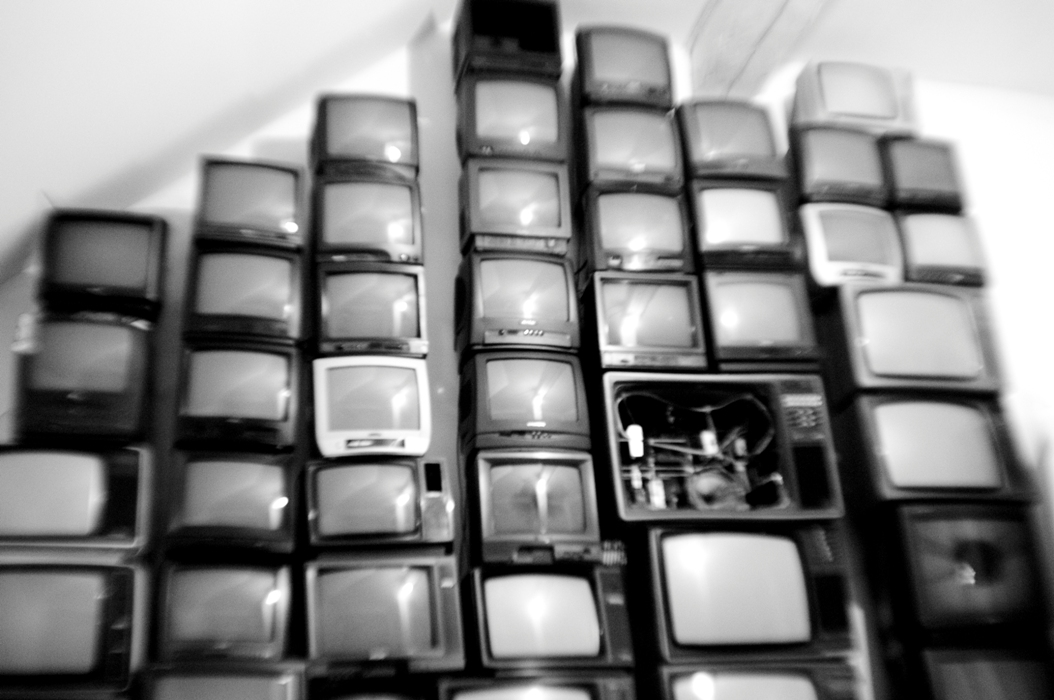 Demolden Video Project, Luis Bezeta